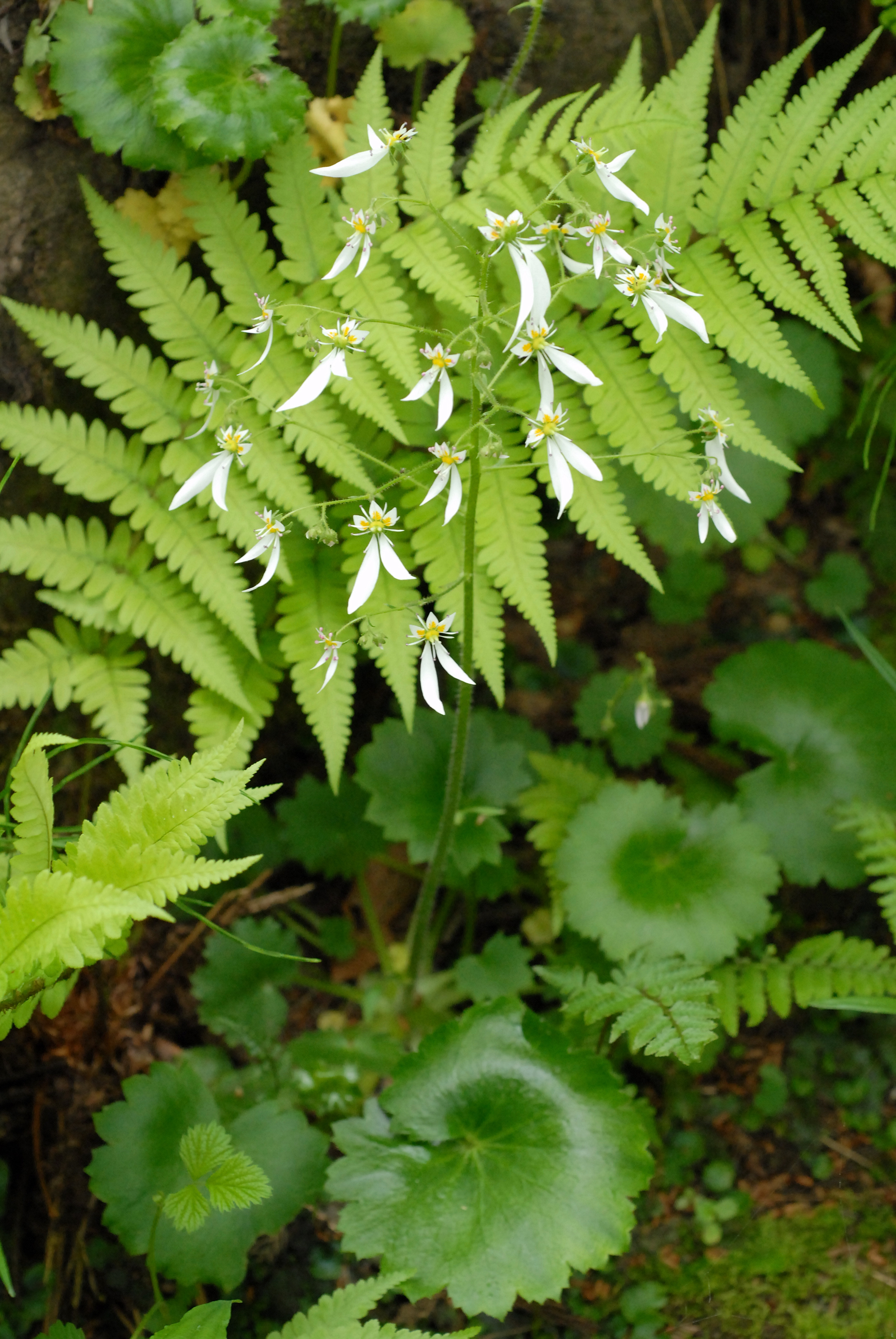 ハルユキノシタの全景 Saxifraga nipponica Makino